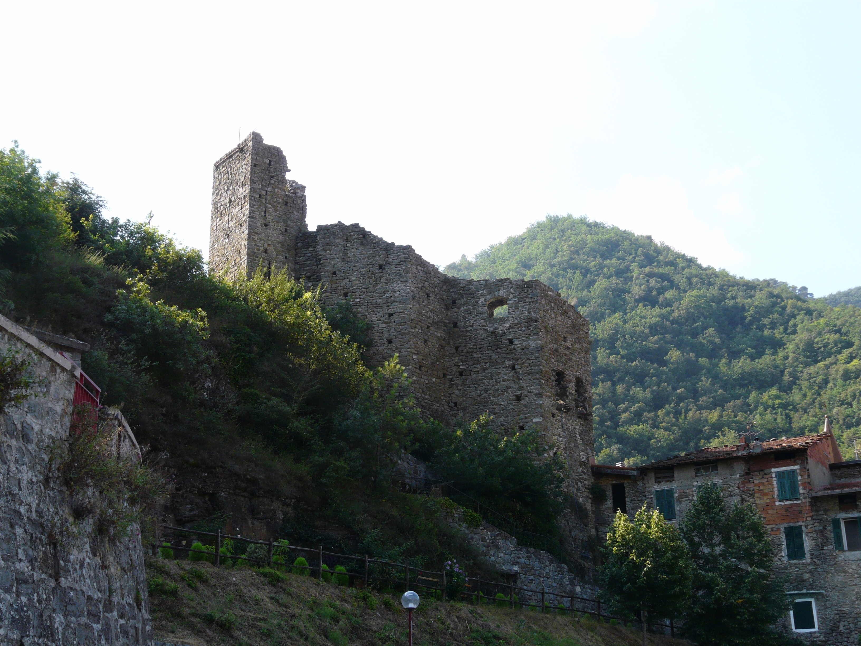 Castello Doria, Isolabona, Liguria, Italia